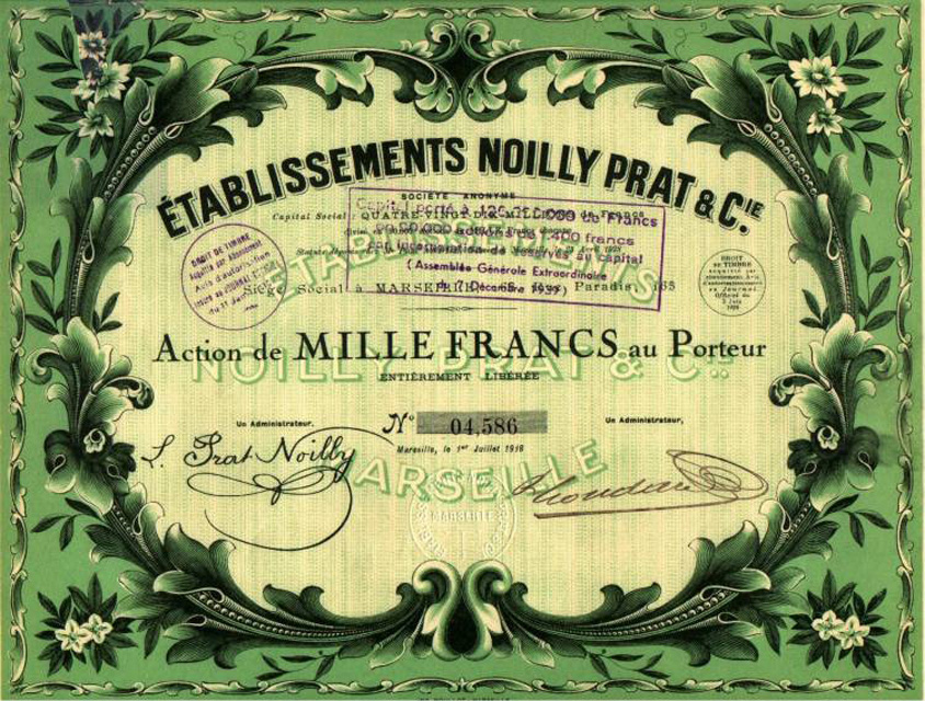 Action Noilly Prat 1000 f au porteur